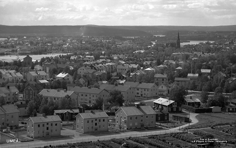 Miljöer; Stadsmiljö